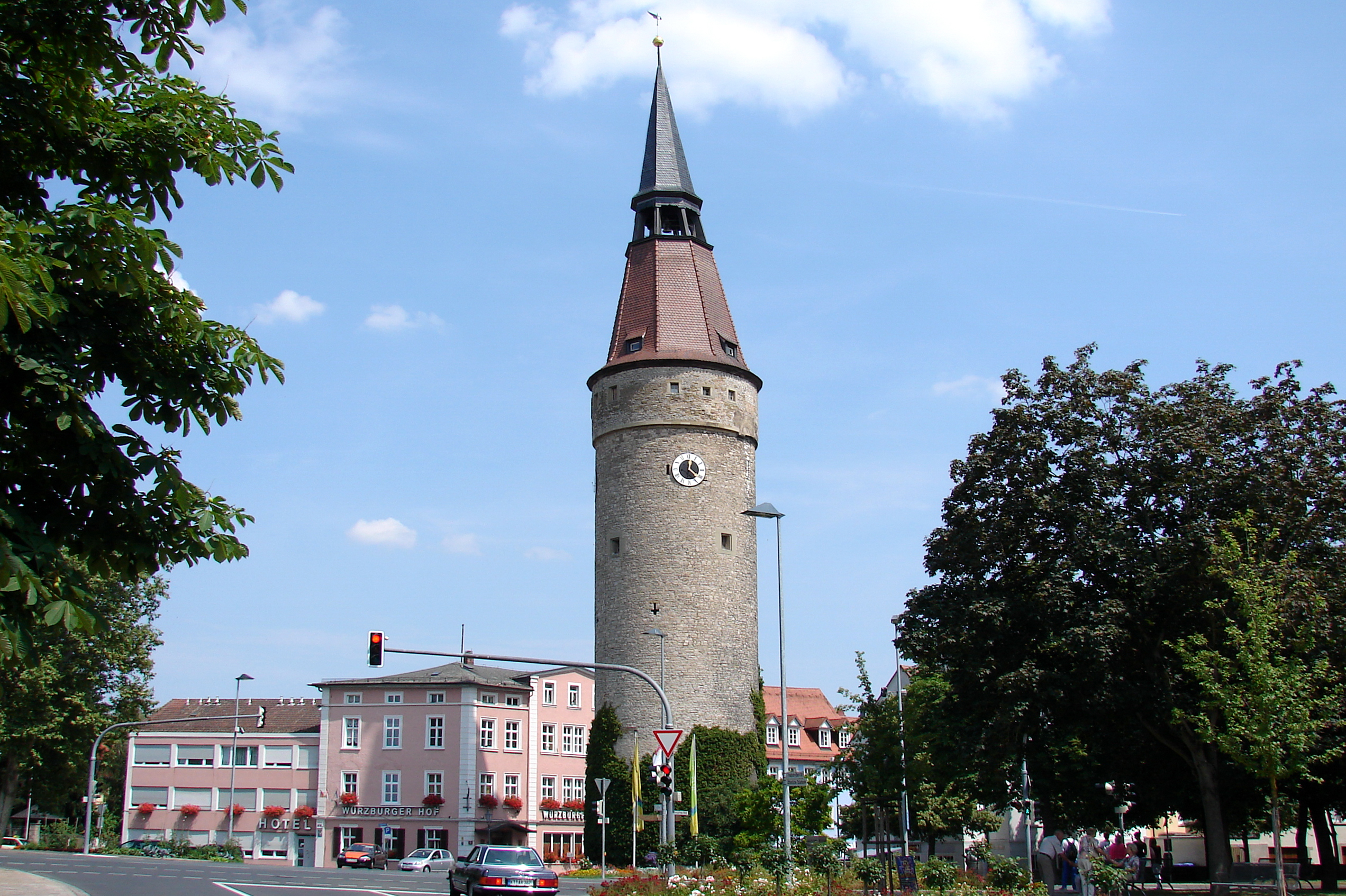 Befestigungsturm der äußeren Stadtmauer, Ende 15. Jahrhundert